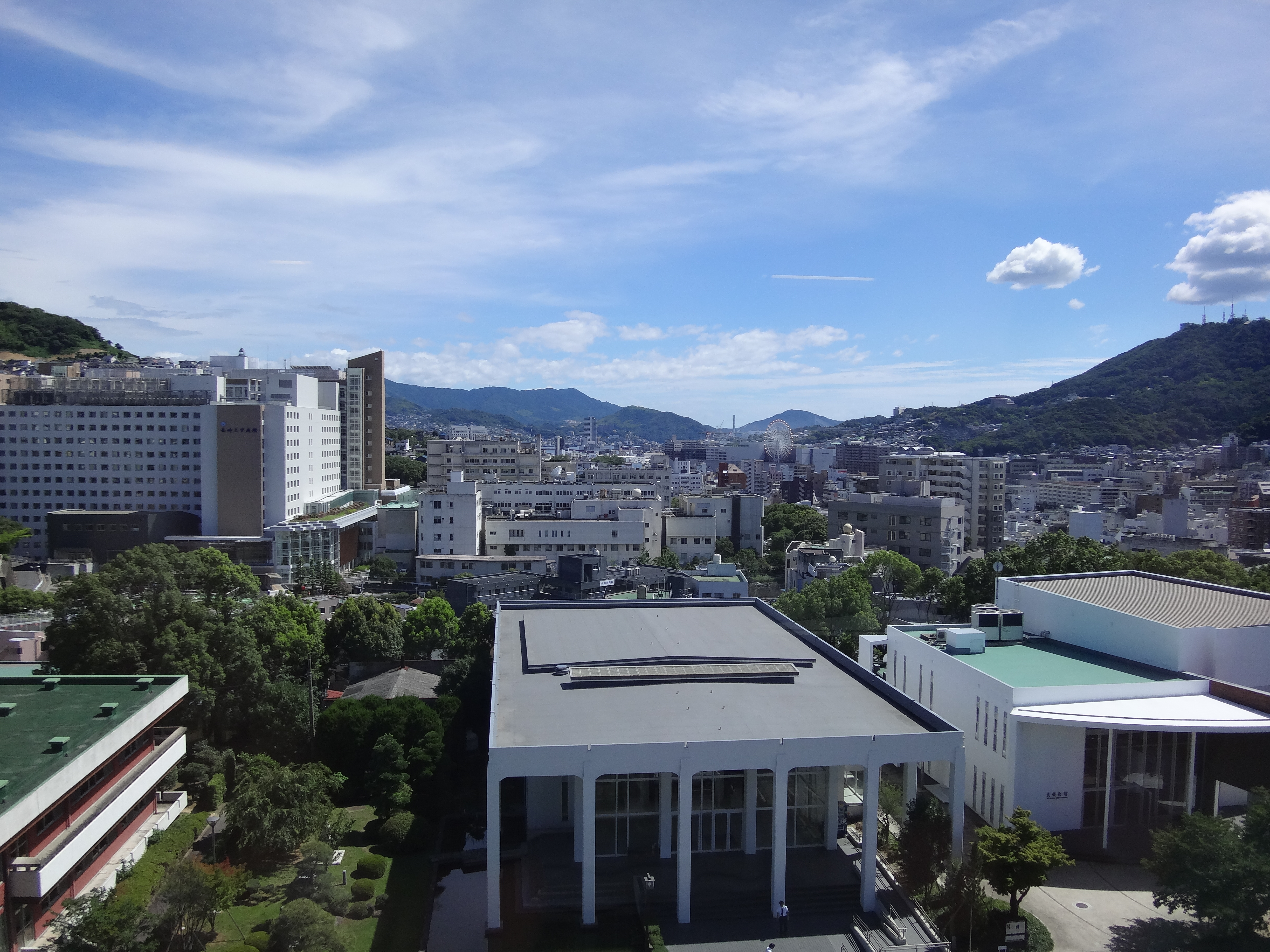 Nagasaki University